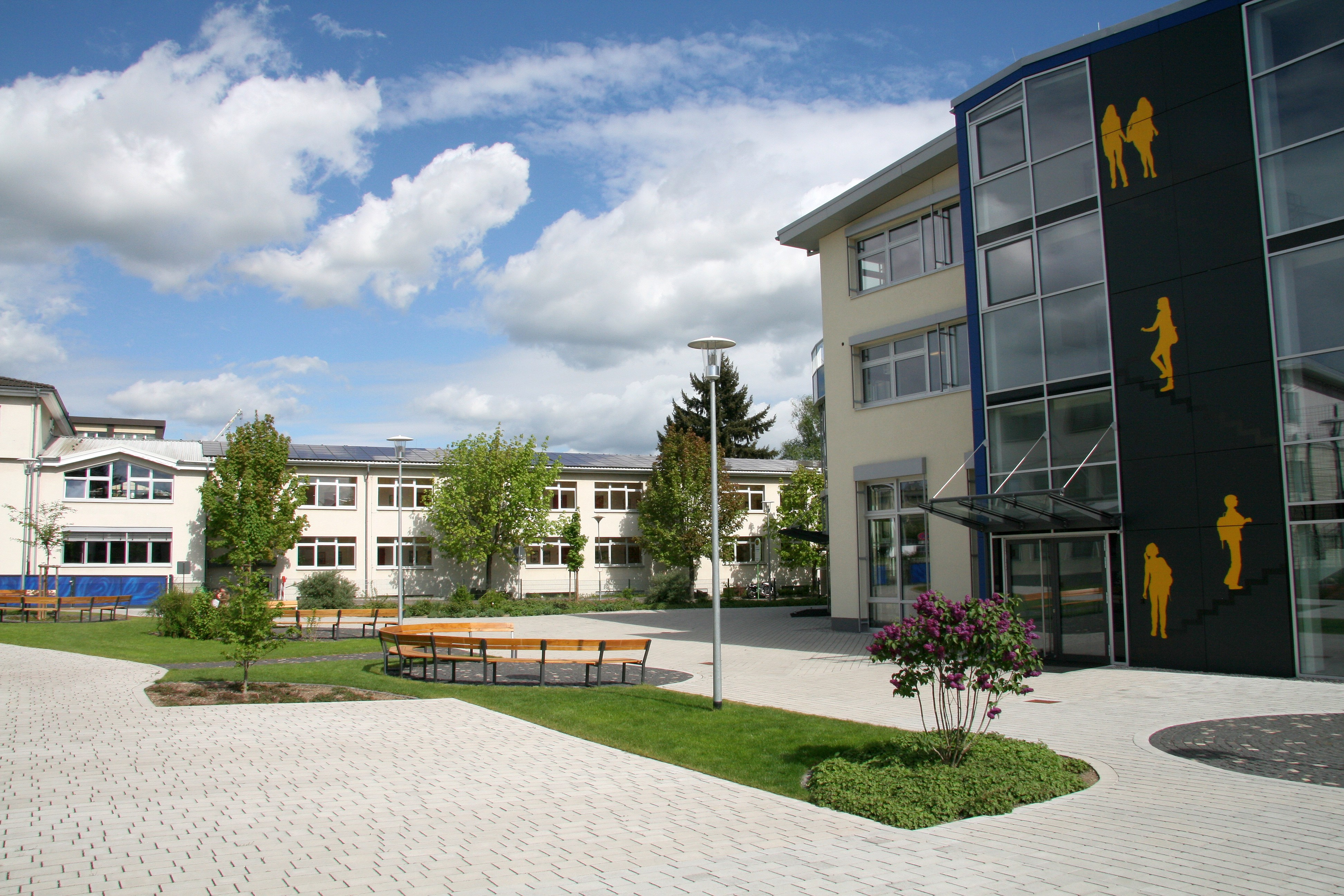 August-Hermann-Francke-Schule Gießen, Häuser 1-2, Ansicht von Südosten